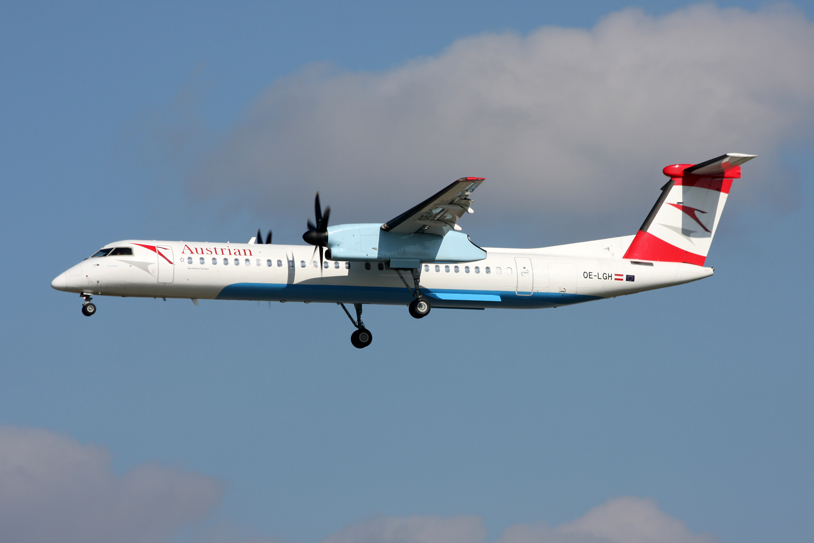 Frankfurt am Main (Rhein-Main AB) (FRA / EDDF / FRF) Germany 9.2013